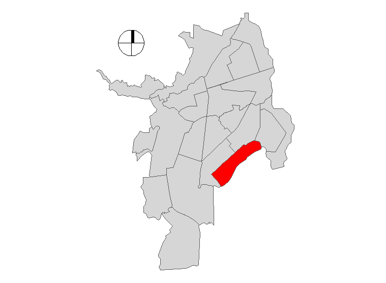 Comuna de Santiago de Cali, Colombia.